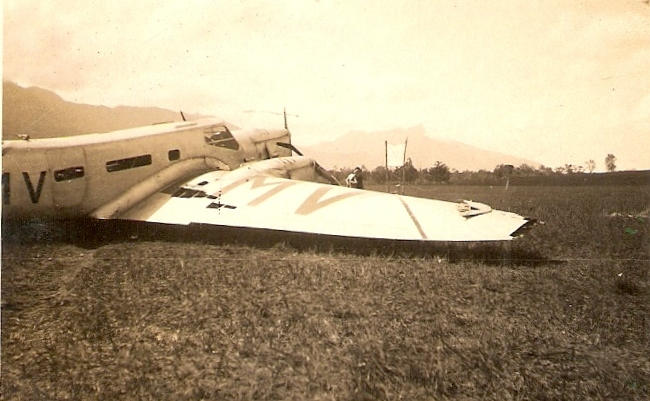 Biarritz Noumea Tontouta 6 avril1932